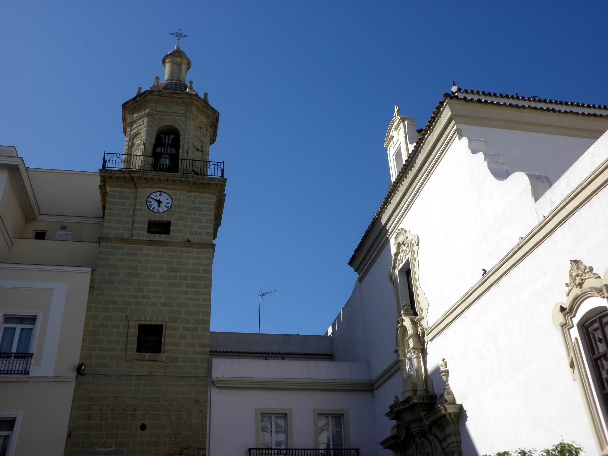 Iglesia de San Francisco, Cádiz, España.